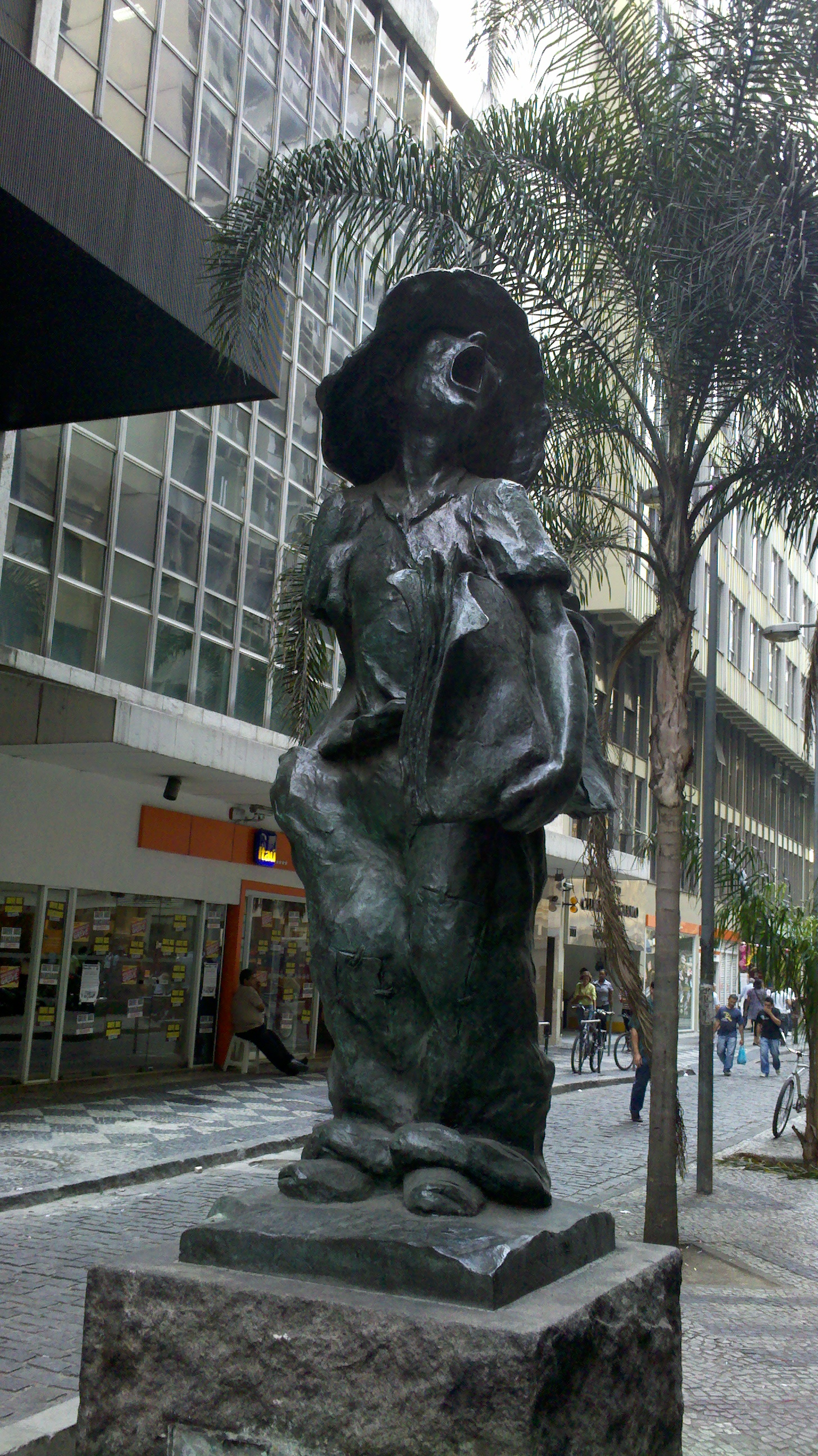 A estátua do “Pequeno Jornaleiro” é um trabalho de autoria do artista Fritz, que compôs um tipo humano e real: o garoto, com as vestes remendadas e em desalinho, apregoa as folhas que tem sob o braço. Foi modelada e fundida nas oficinas Zani e descansa sobre um pedestal de granito. Fonte: Monumento ao Pequeno Jornaleiro, por Diário de Notícias